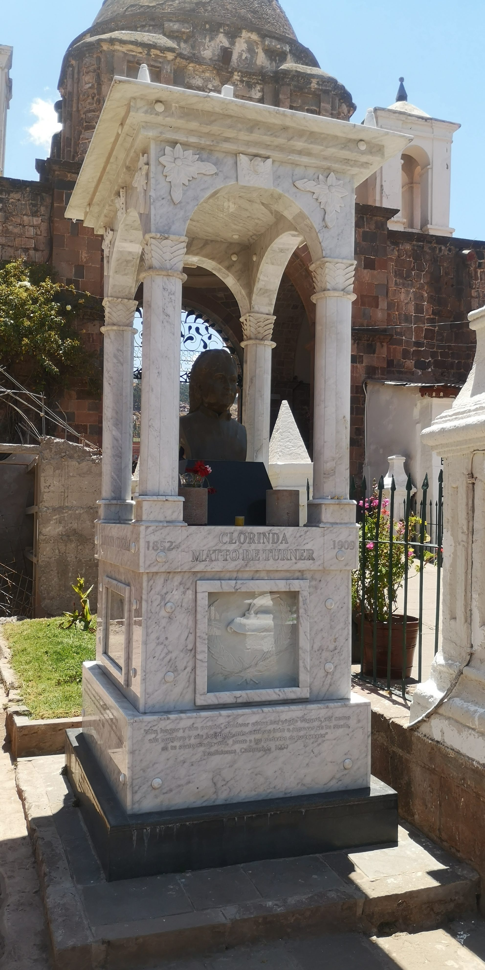 Mausoleo de Clorinda Matto de Turner en Cusco, Perú